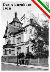 Couleurkarte des Hauses der A.V.Alania zu Stuttgart im CV